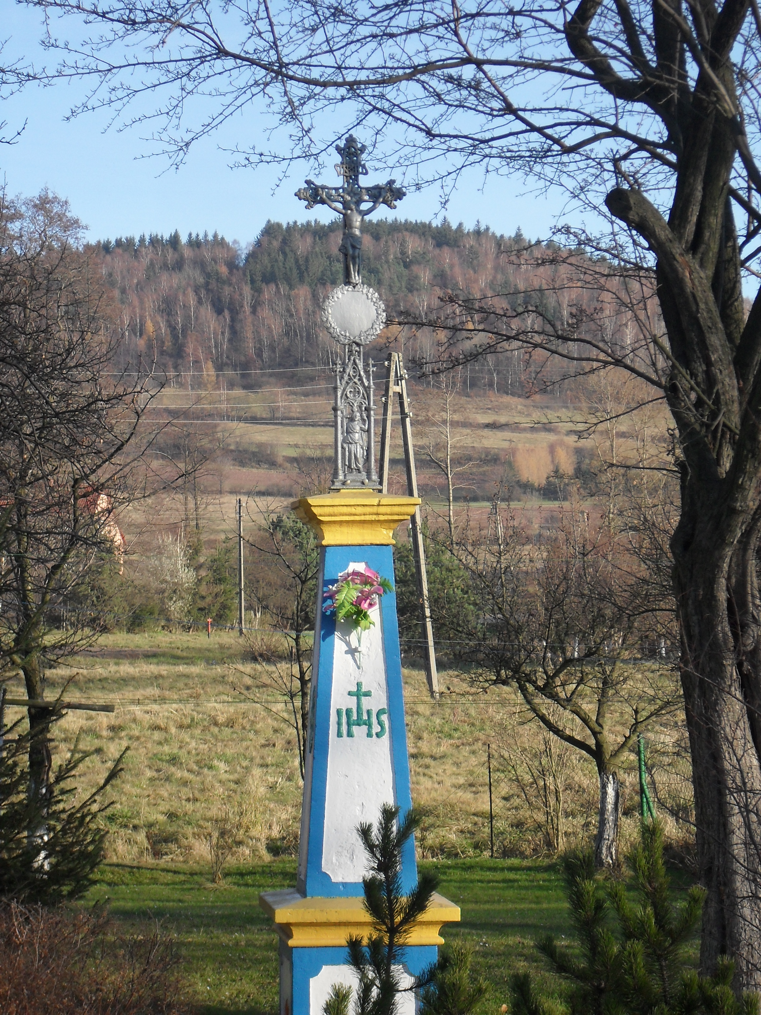 Przedwojów, krzyż przydrożny